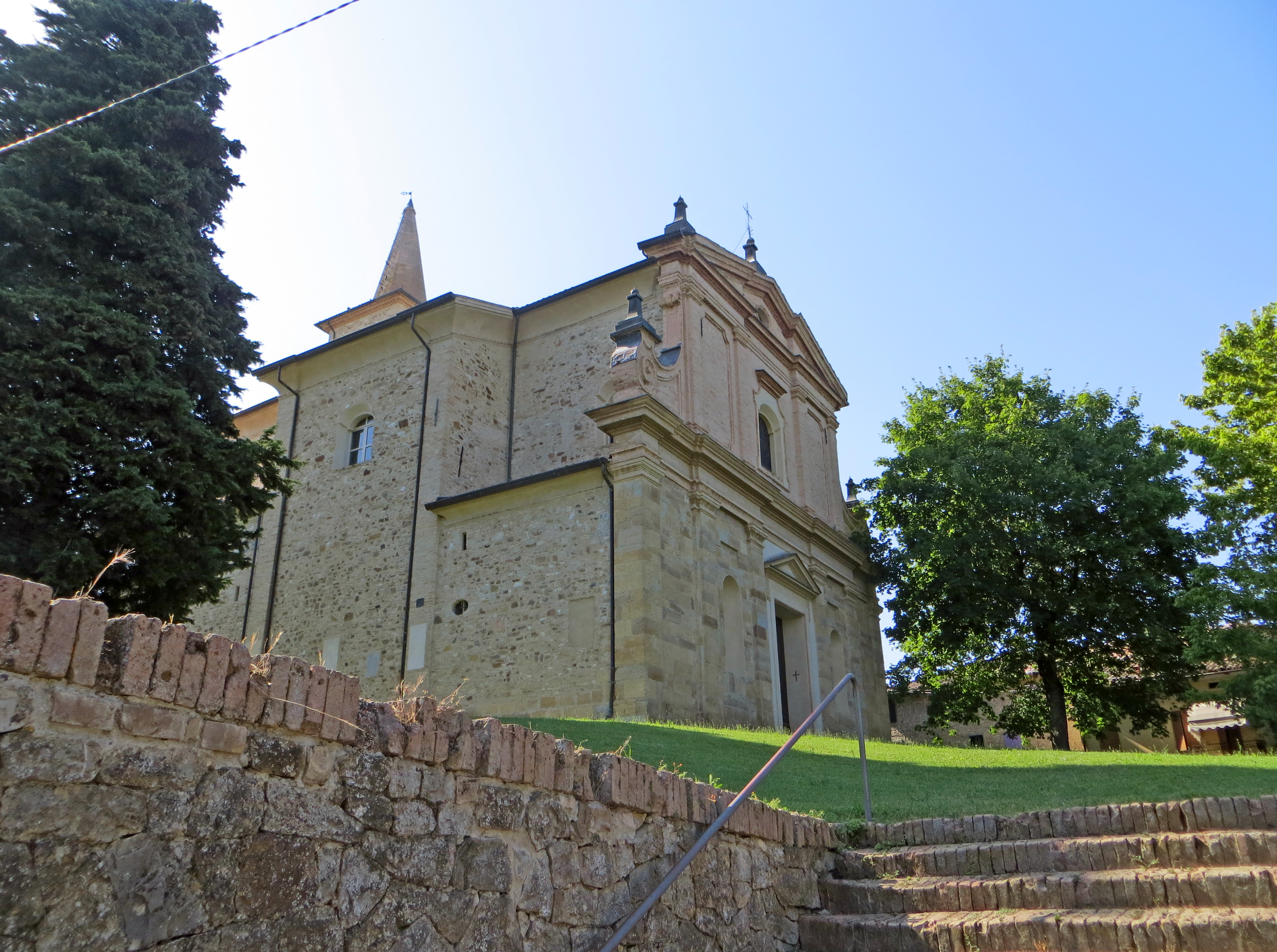 Chiesa di San Michele Arcangelo (Mattaleto, Langhirano) - facciata e lato sud